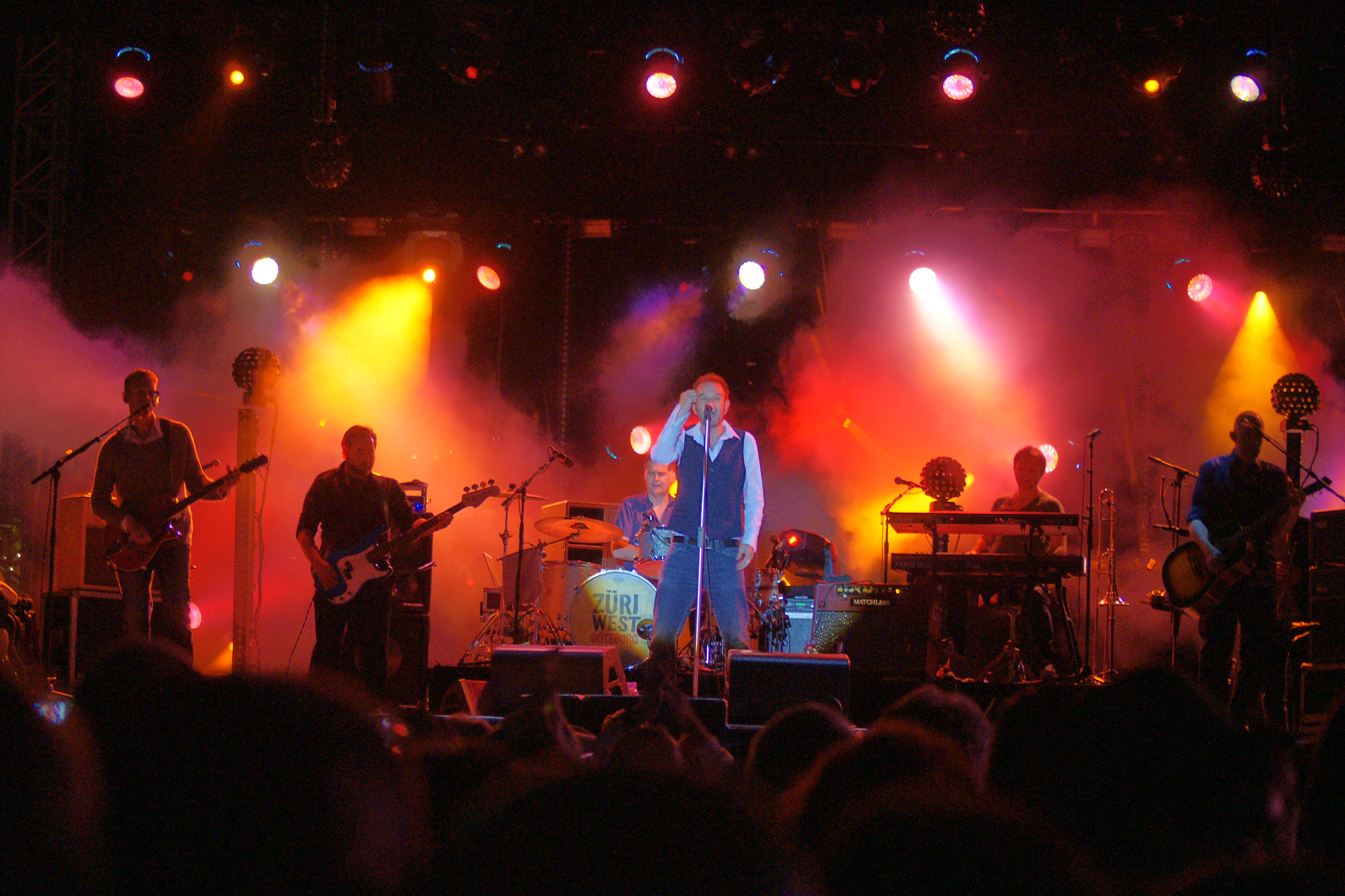 Die Schweizer Rockband Züri West am "Stars of Sounds"-Konzert in Aarberg, 1. Juni 2012.